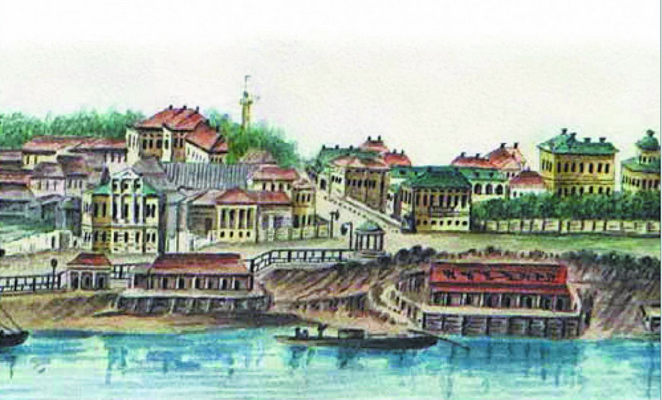 П. Е. Размахнин. Вид Перми. Акварель. 1832 год. Фрагмент.